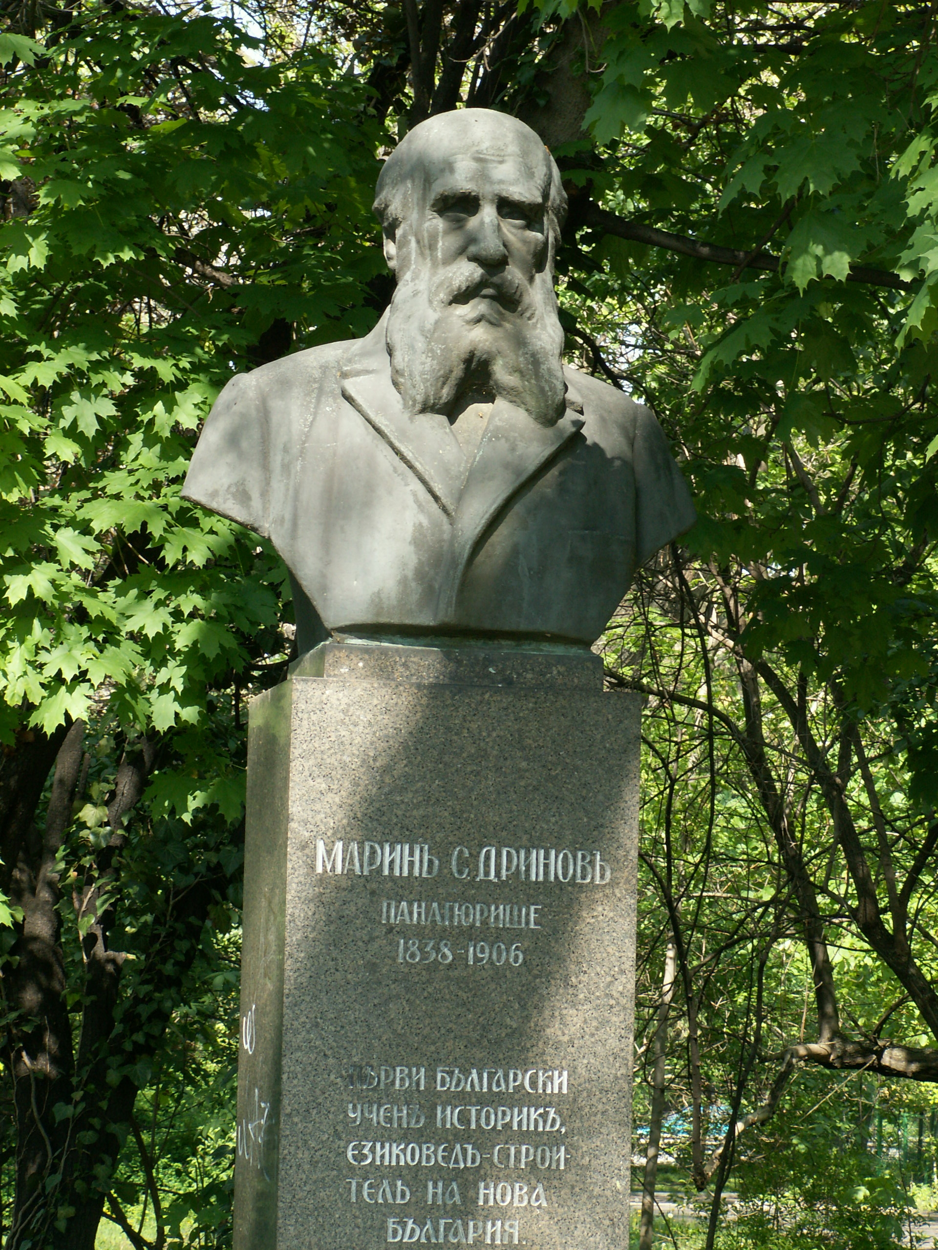 Buste de Marin Drinov dans le Jardin de Boris (Borisova gradina) à Sofia